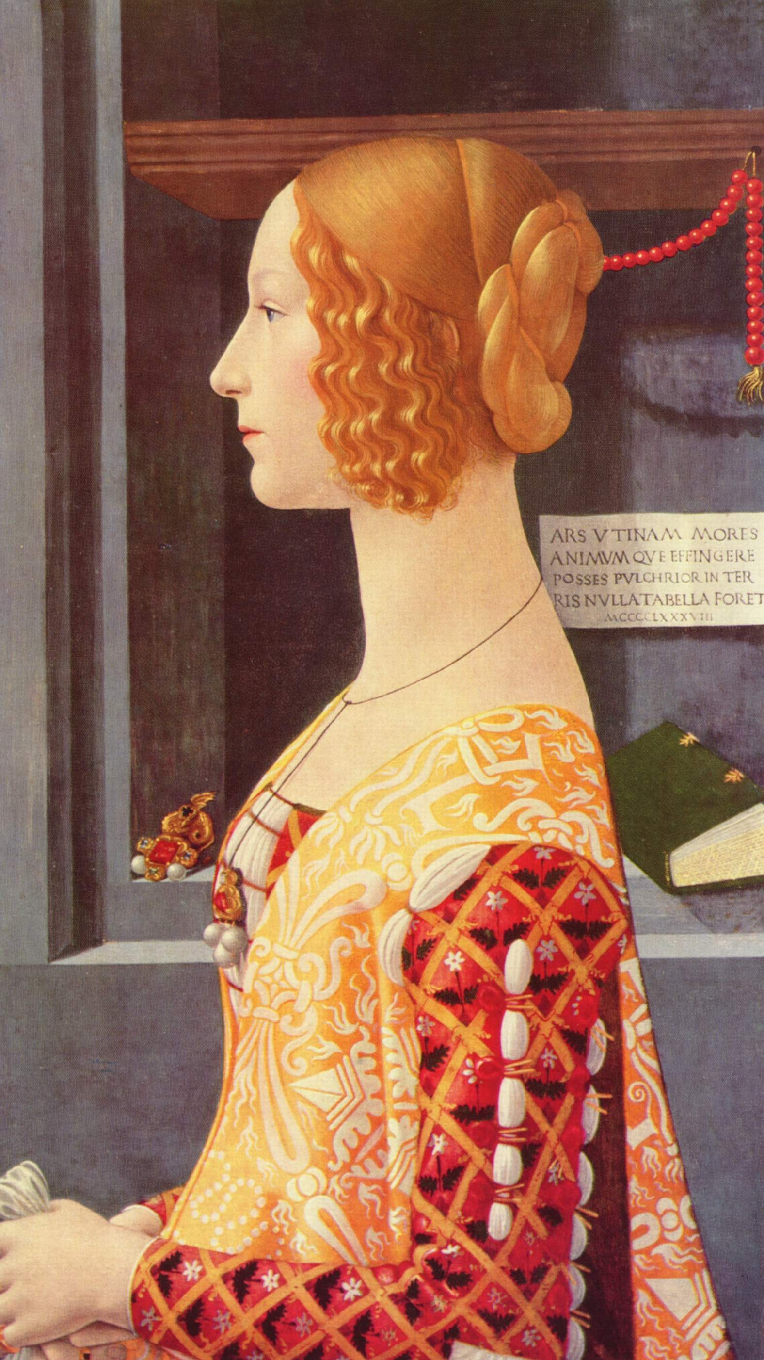 Depicted person: Giovanna Tornabuoni